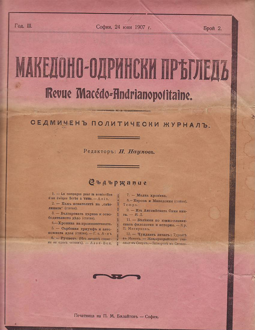 Списание Македоно-одрински преглед.